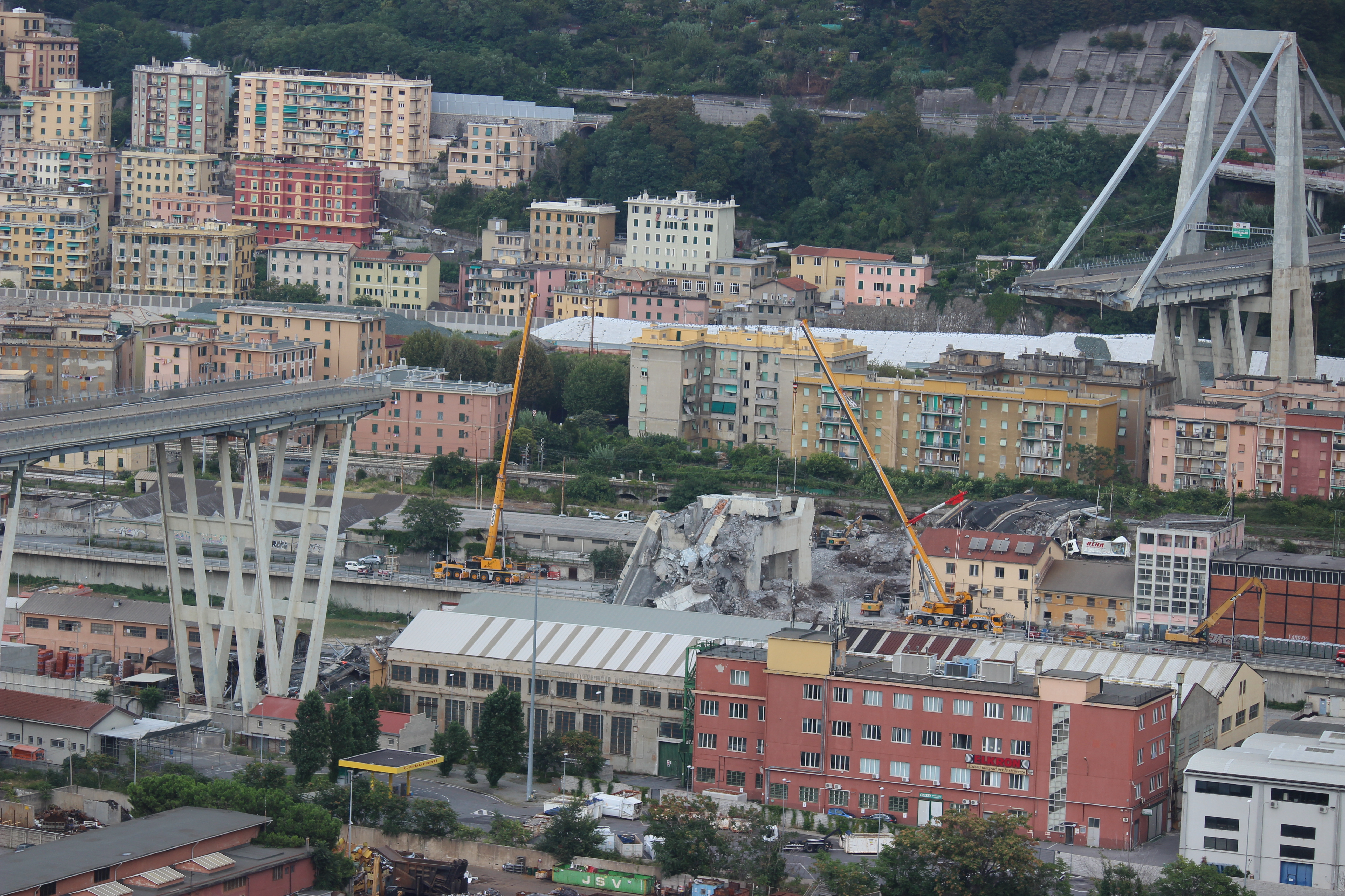 Immagine del Ponte Morandi, dopo il crollo avvenuto il 14 agosto 2018.